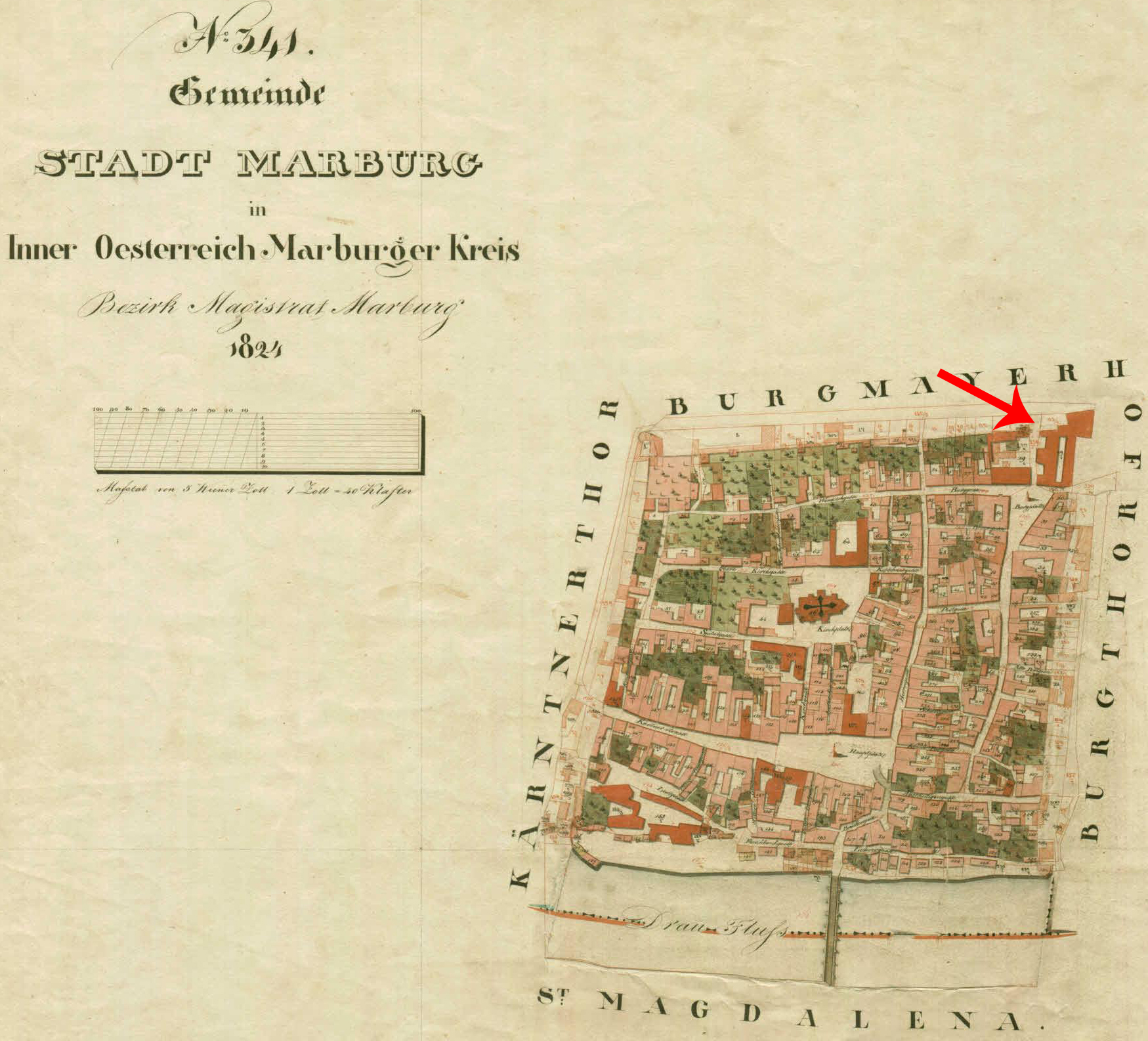 Franciscejski kataster za Štajersko, 1823-1869